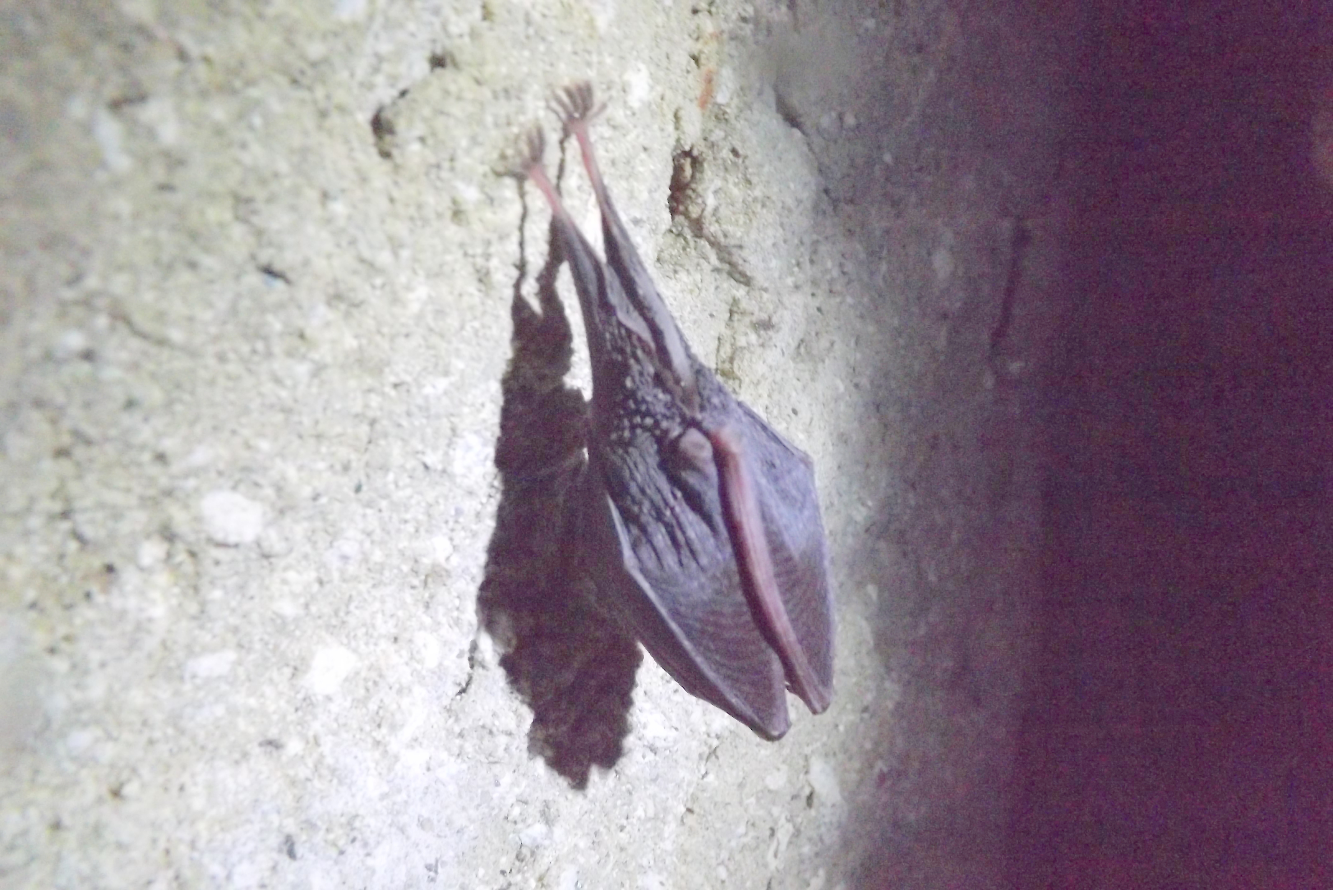 Alvó denevér a Léleklyuk-barlang mennyezetén